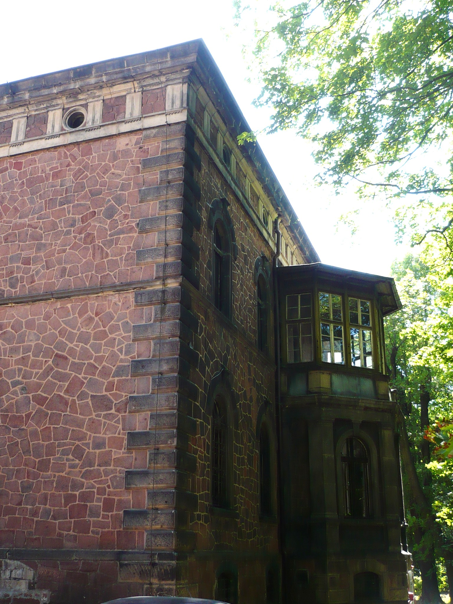 Nowa Ruda, ul. Niepodległości 2 - pierwotnie budynek starostwa powiatowego, następnie siedziba szkoły milicyjnej, sądu, prokuratury, kolegium ds. wykroczeń, komornika, Gminnego Ośrodka Pomocy Społecznej, Rady Gminy Nowa Ruda, obecnie VII Zamiejscowy Wydział Ksiąg Wieczystych i świetlica kuratorska, 1877